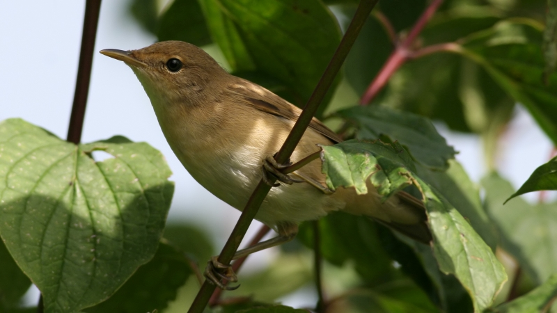 Marsh Warbler (Acrocephalus palustris), Rheinspitz, Vorarlberg, Austria